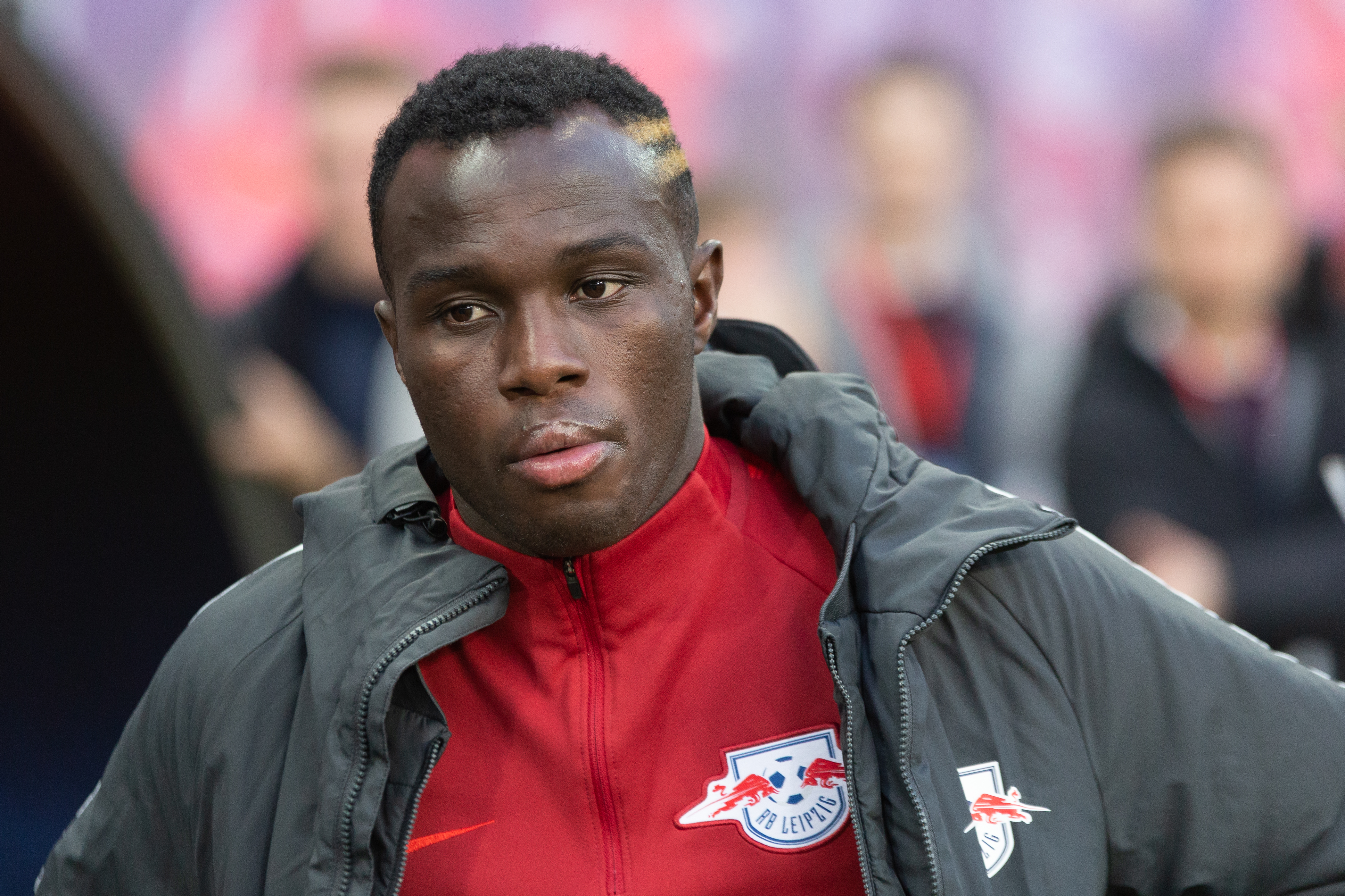 Fußball, Männer, 1. Bundesliga, RB Leipzig - Hertha BSC; "Bruma" Armindo Tue Na Bangna (RB Leipzig, 17); Porträt, Einzelbild